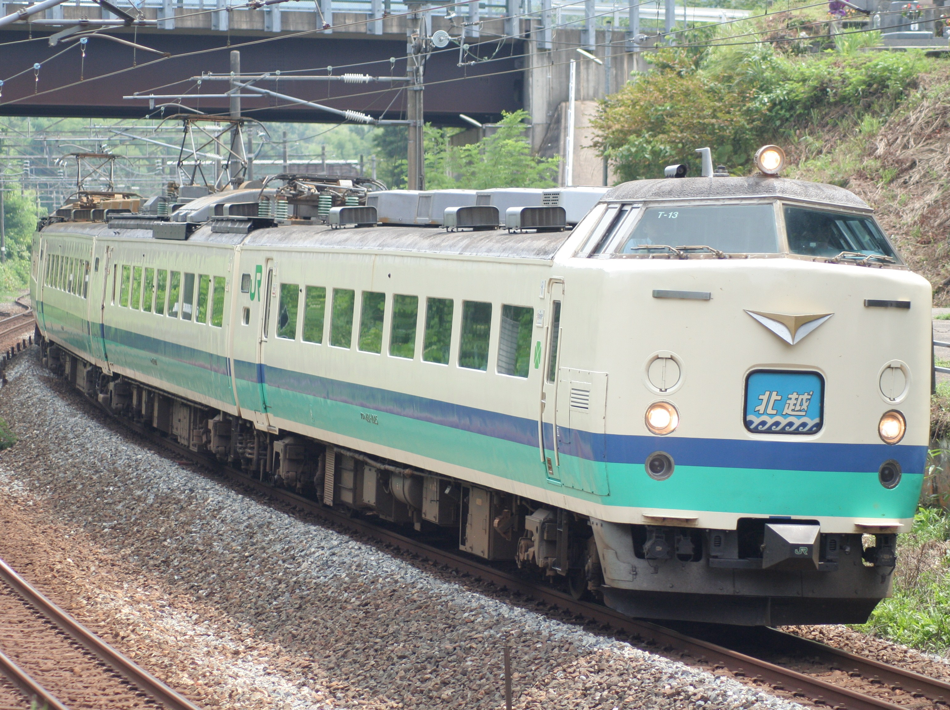 JR東日本485系電車T13編成 特急北越 北陸本線、倶利伽羅駅付近